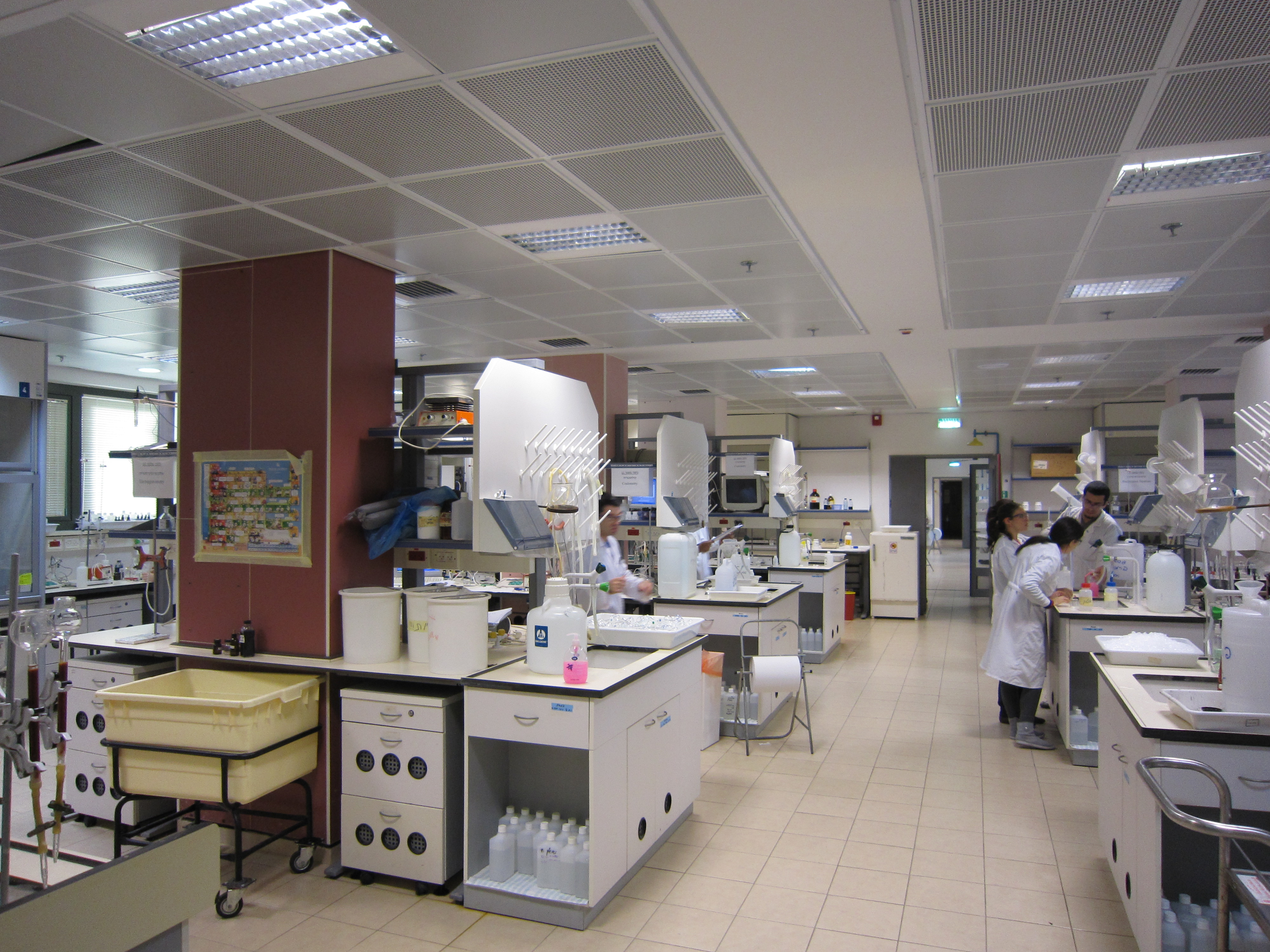 הפקולטה לכימיה בטכניון